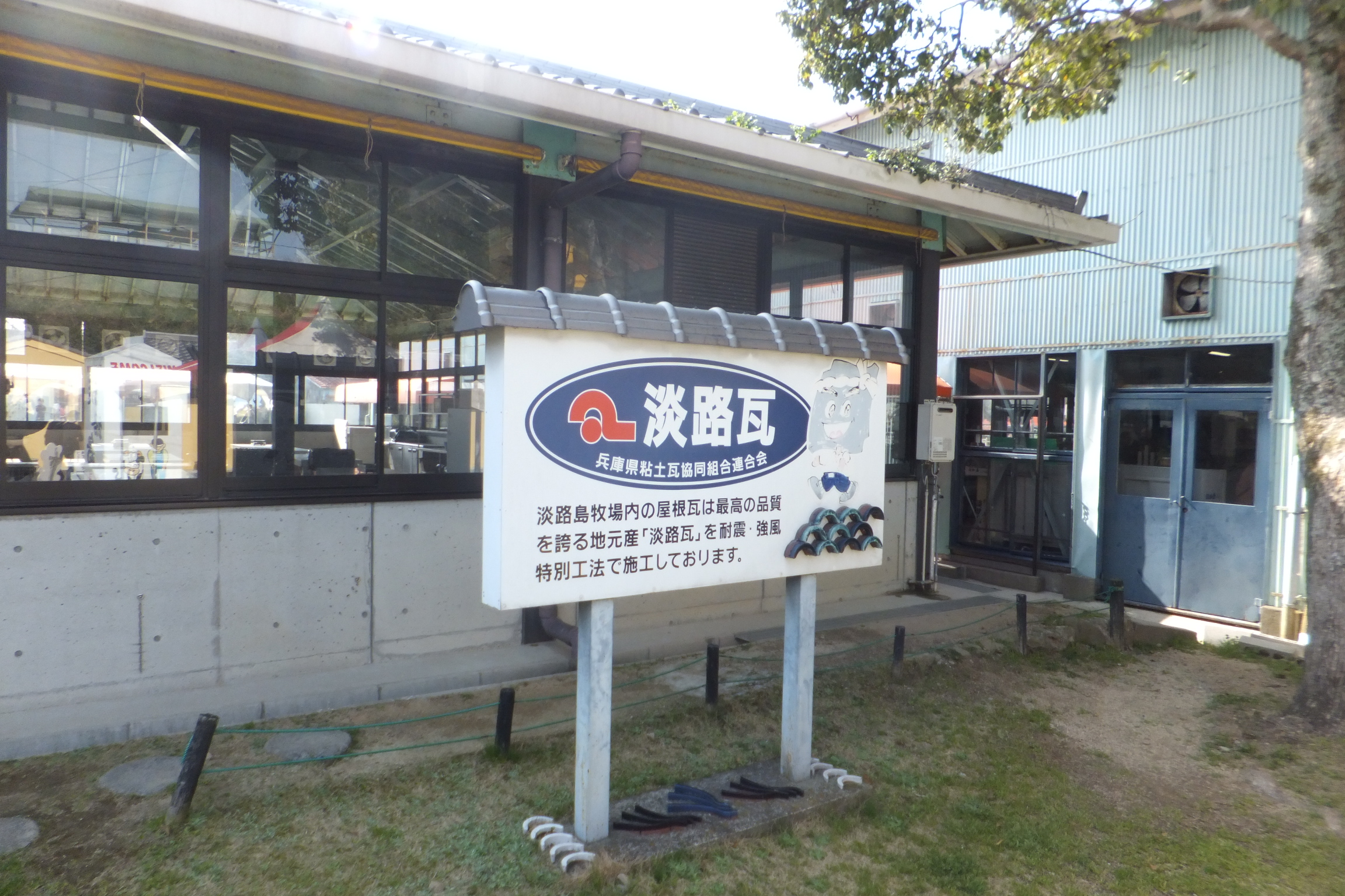 淡路瓦の情報